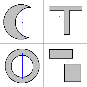 Beispiele konkaver Figuren der Ebene.